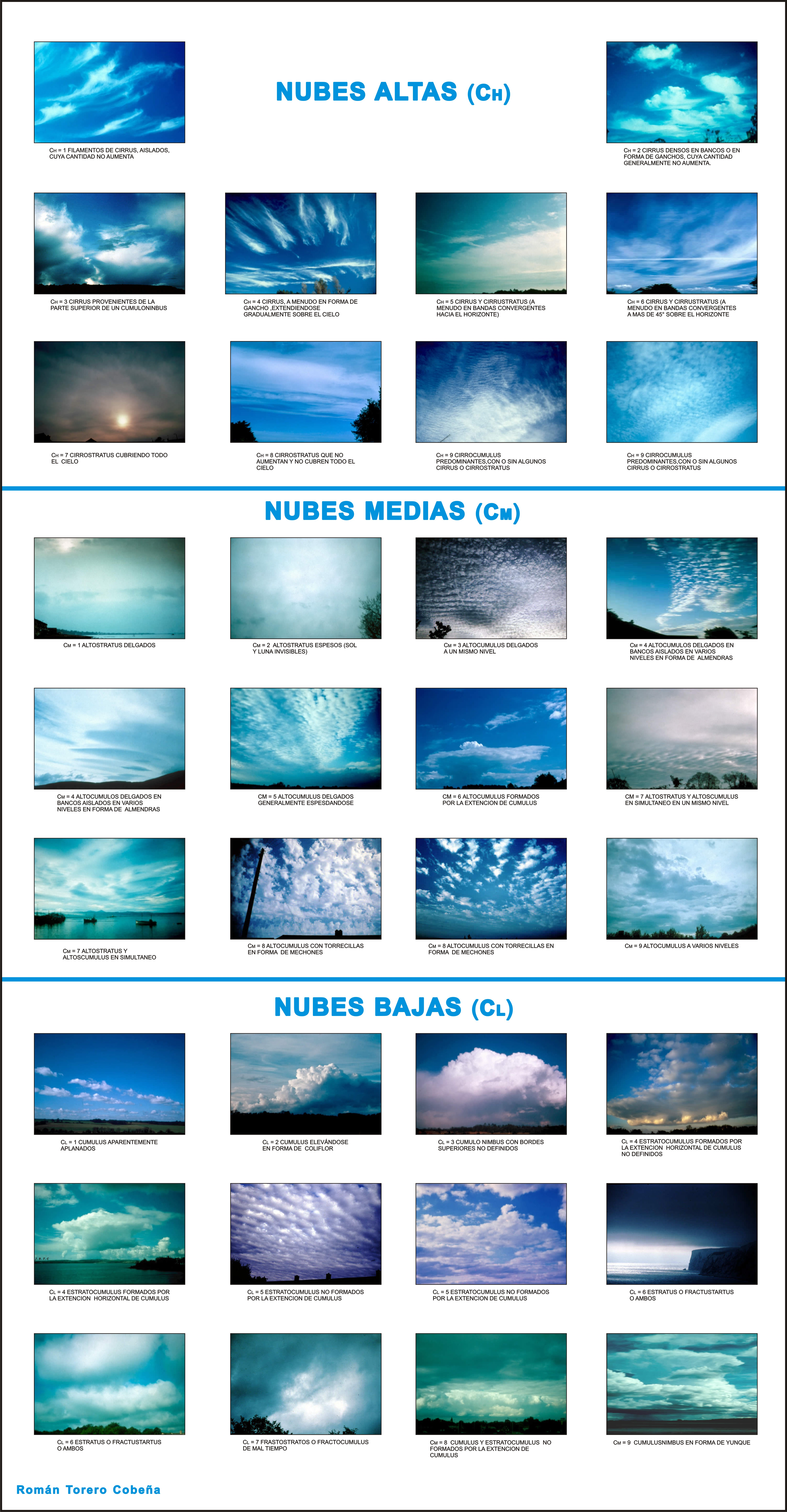 Cuadro de Nubes - Perú